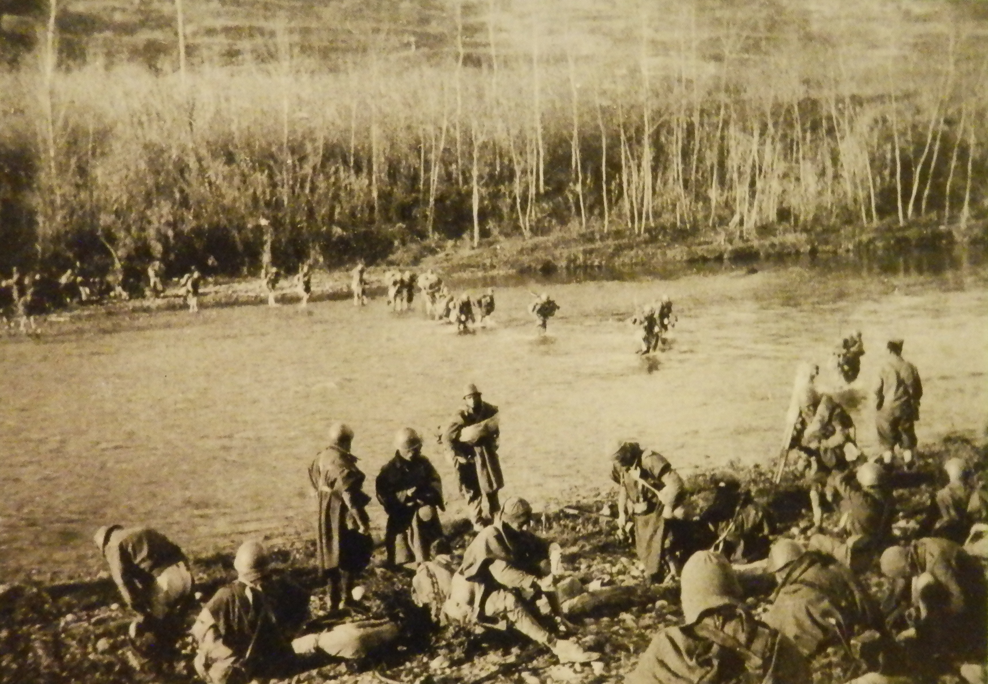 Fotografia de l'exposició "Fu la Spagna!" on es veuen tropes del CTV creuant el riu Llobregat durant l'Ofensiva de Catalunya, l'any 1939.